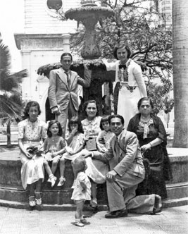 Inmigrantes franceses en Chile